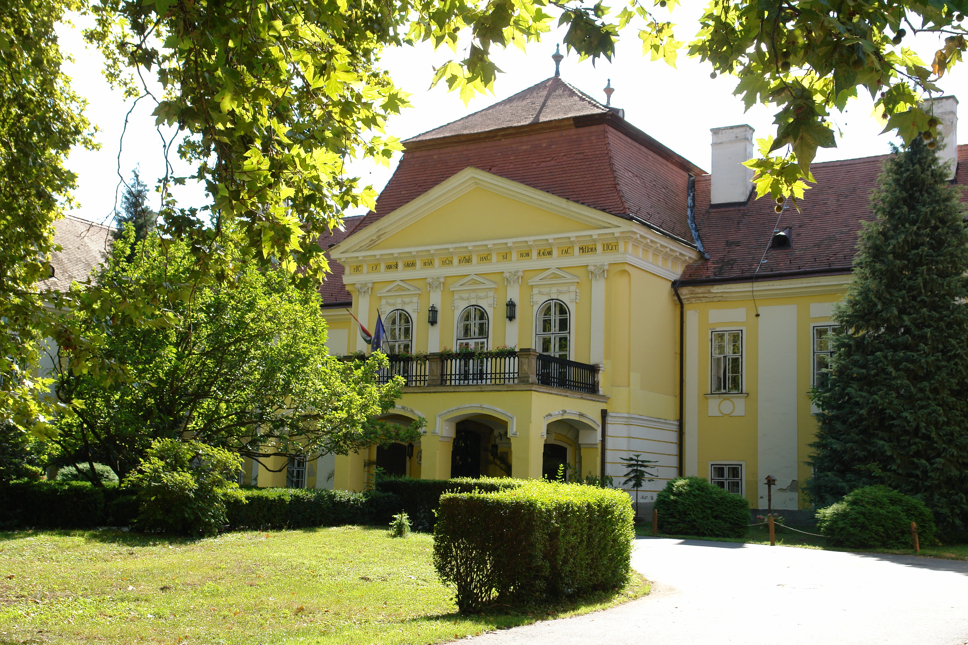 Batthyány-kastély és parkja, Zalaszentgrót This is a photo of a monument in Hungary. Identifier: 11110